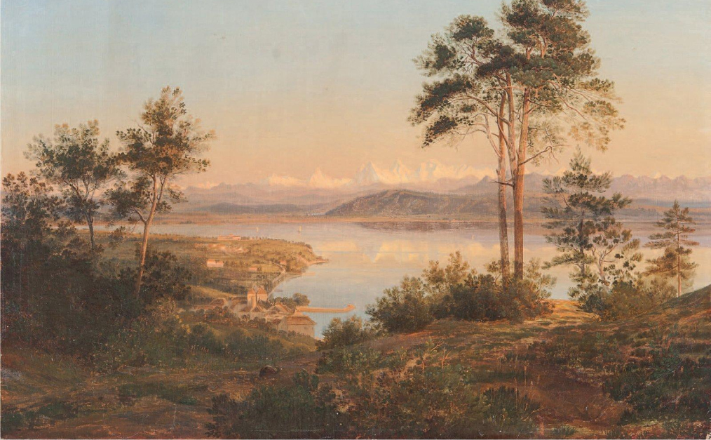 Le lac de Neuenburger et le village de Saint-Blaise